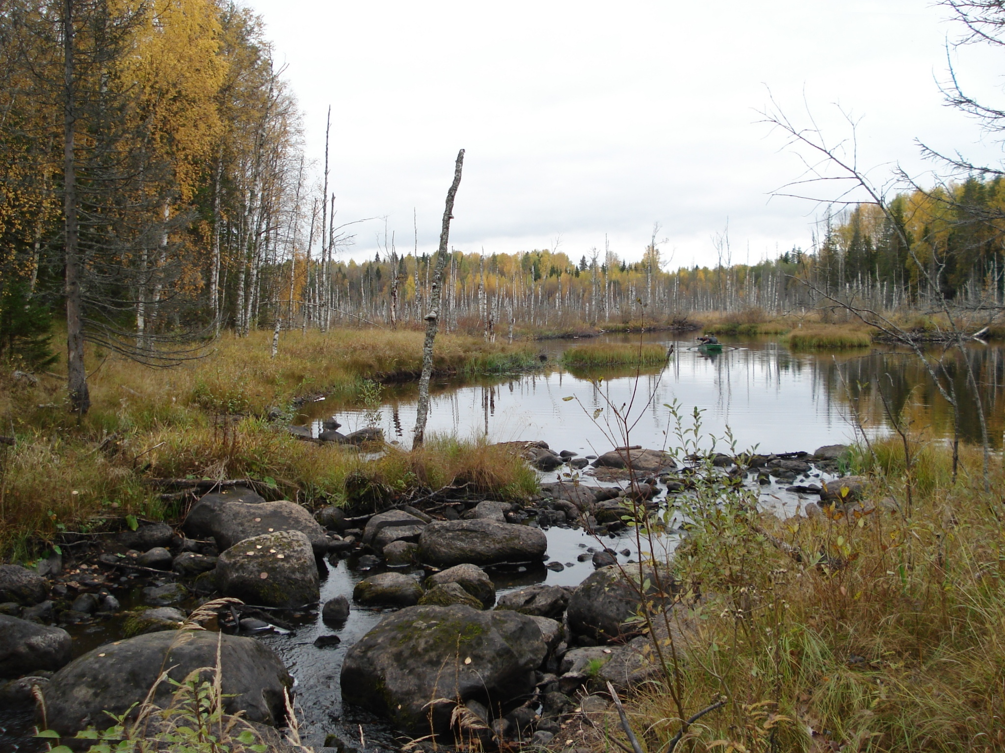 Сона